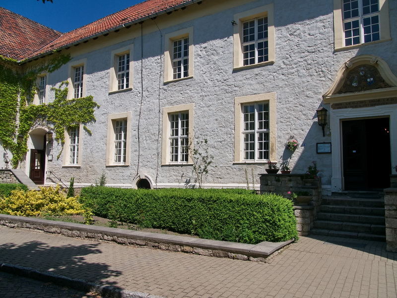 Hauptgebäude Tagungszentrum Kloster Hedersleben